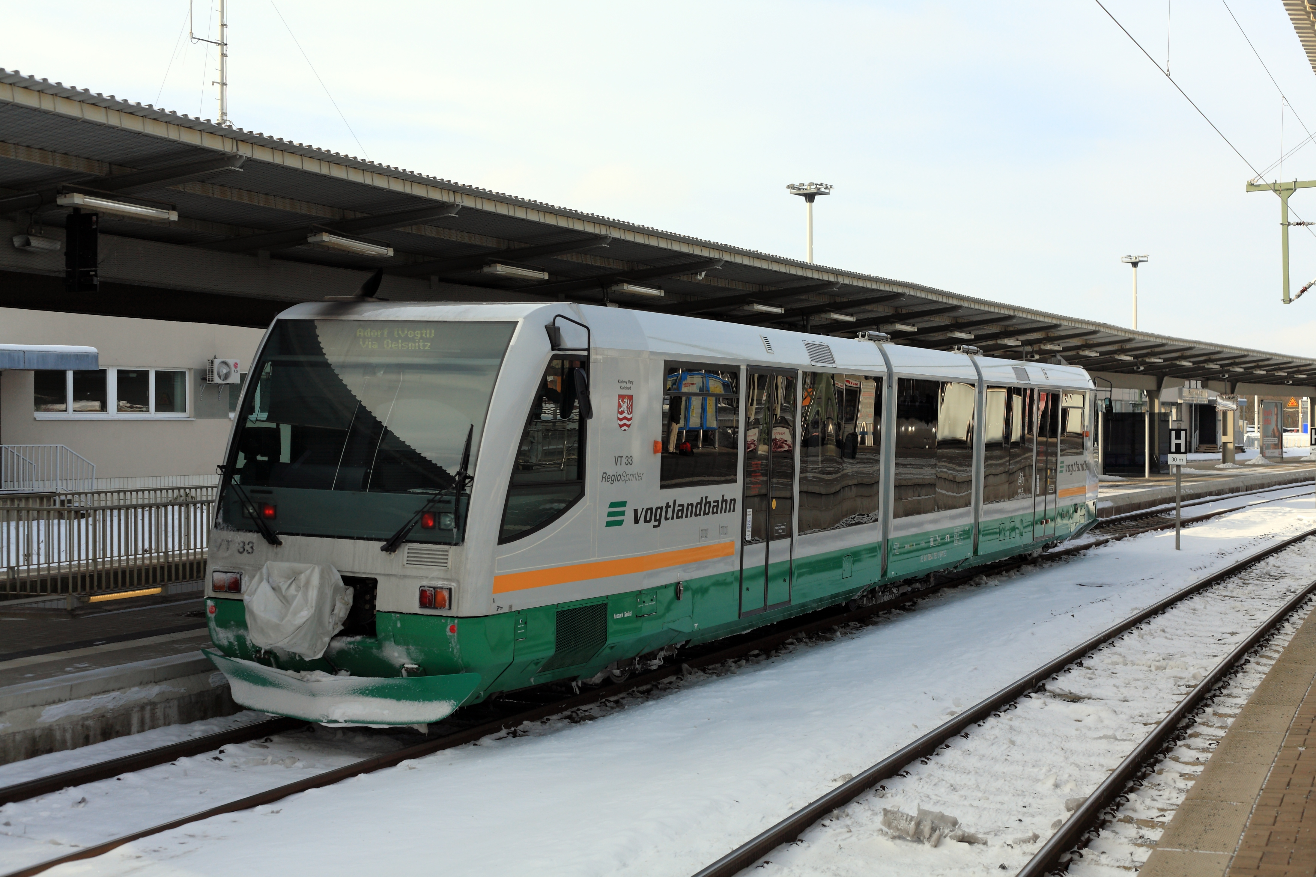 Regionalzug nach Adorf über Oelsnitz (Vogtl). Der Triebwagen ist für die Strecke Zwickau Hbf–Zwickau Zentrum nach BO Strab ausgerüstet, erkennbar an den Brems- und Blinklichtern. Die planmäßig von den Zügen von und nach Bad Brambach genutzten Bahnsteiggleise 1 und 2 wurden nicht mit überspannt. Sparen nach Art der FDP.